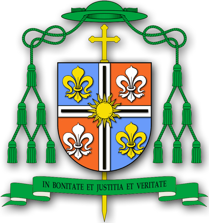 Brasão do Bispo Luís Victor Sartori. Enquartelado: em 1 e 4, de azul com uma flor de lis de ouro (representando a Imaculada Conceição), em 2 e 3, de vermelho, uma flor de lis de prata (representando São José). Sobre todo o campo, uma cruz de prata (representando a fé e a ação católica) com cerne de negro (representando o martírio e redenção de Jesus), carregada com um sol de ouro brocante (representando Jesus como o Sol da Justiça e a Luz do Mundo). Moto: In bonitate et justitia et veritate. Descrição do heraldista José Heitgen, autor das armas, In: "Realiza-se hoje na Catedral Metropolitana a sagração episcopal de mons. Luiz Victor Sartori". Jornal do Dia, 01/06/1952.